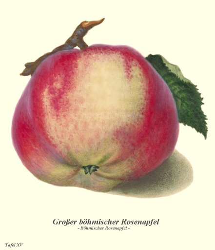 Abbildung eines Böhmischen Rosenapfels aus dem Buch Deutschlands Kernobstsorten